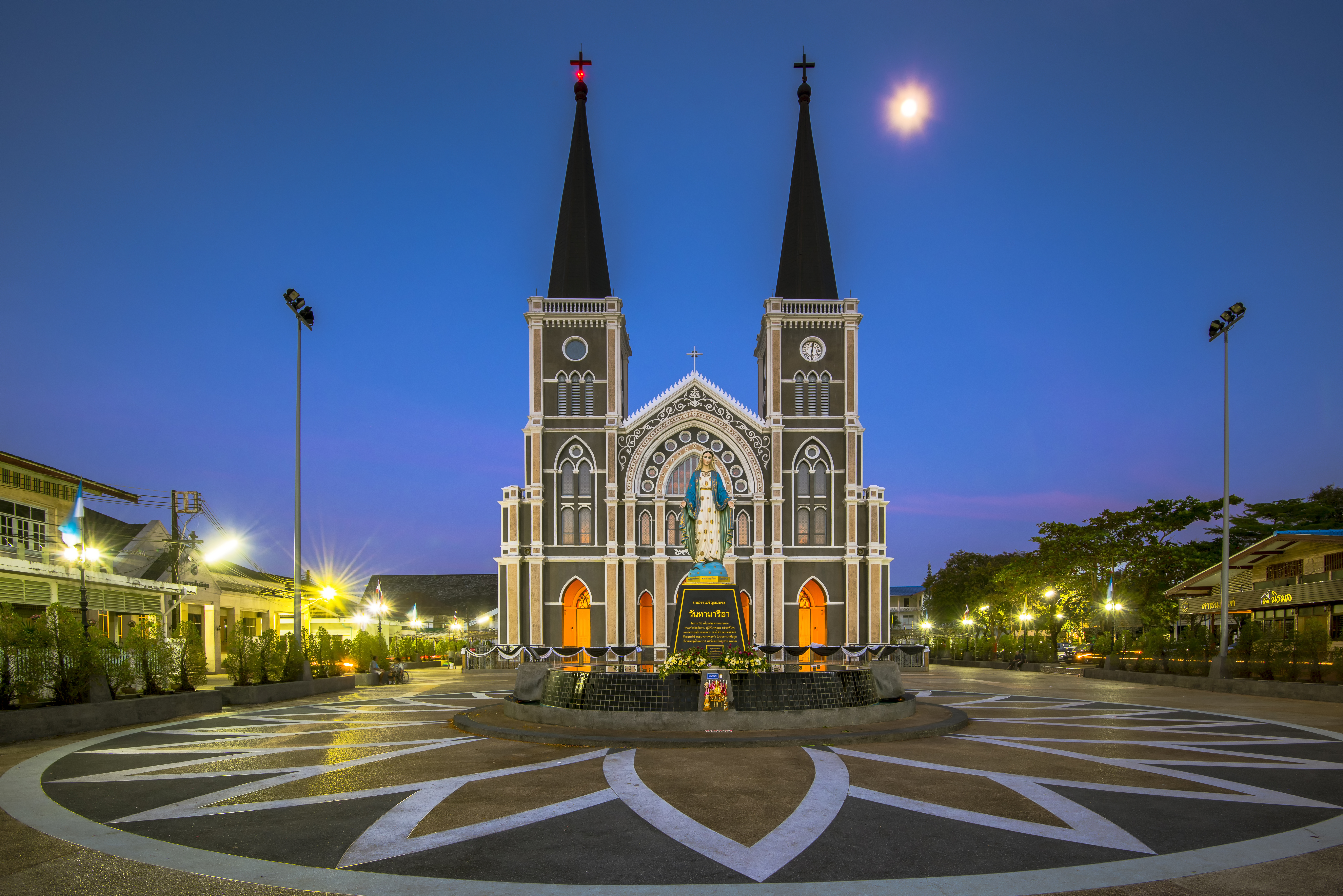 อาสนวิหารพระนางมารีอาปฏิสนธินิรมล